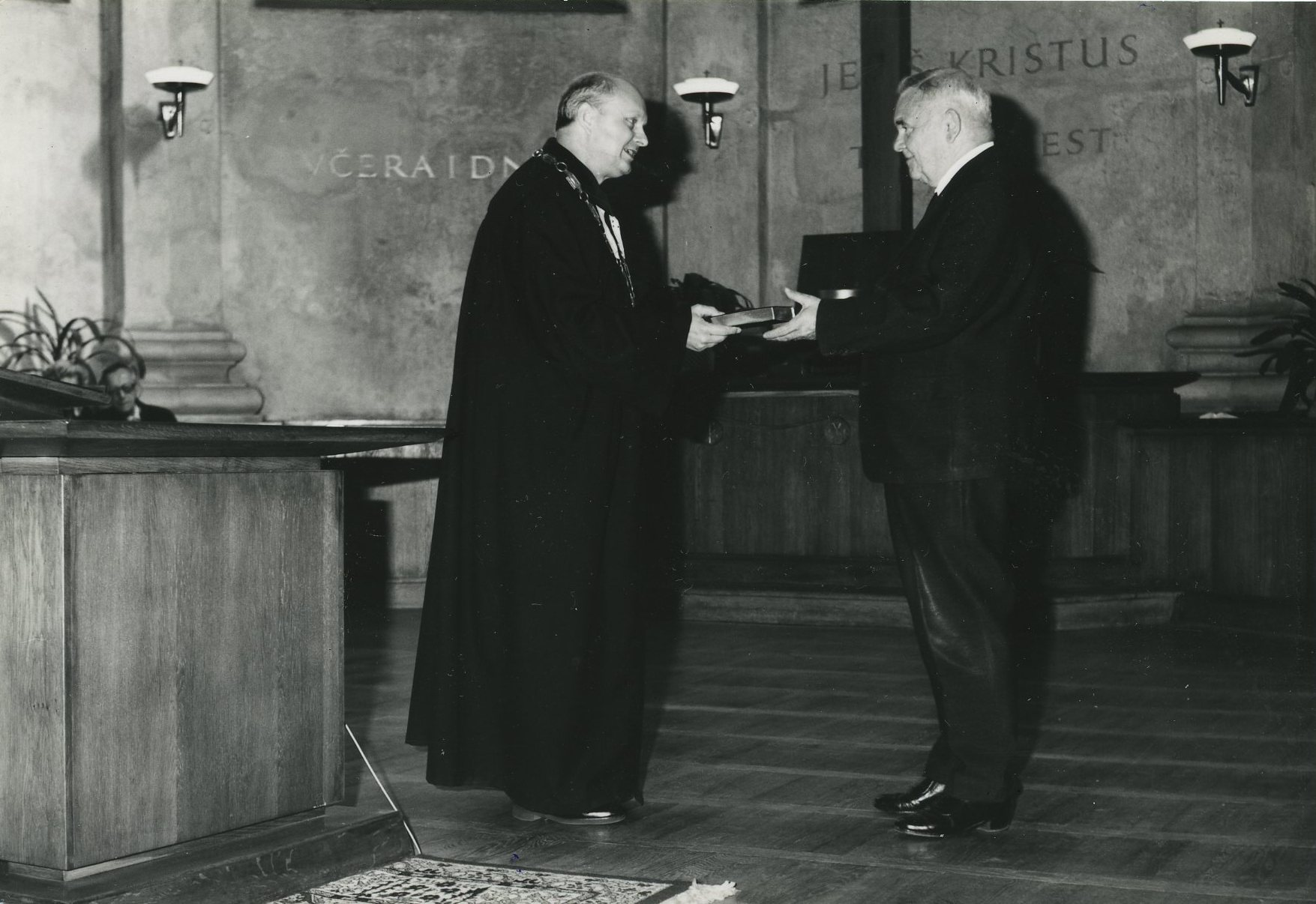 Prof. Miloš Bič předává synodnímu seniorovi Miloslavu Hájkovi ekumenický překlad Bible, 1979